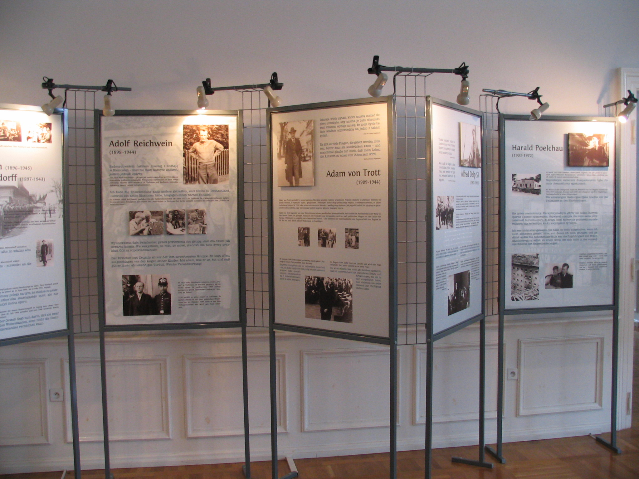 Die Ausstellung „In der Wahrheit leben“ in der Gedenkstätte der Internationalen Jugendbegegnungsstätte Kreisau in Krzyżowa erinnert an die Mitglieder des Kreisauer Kreises.